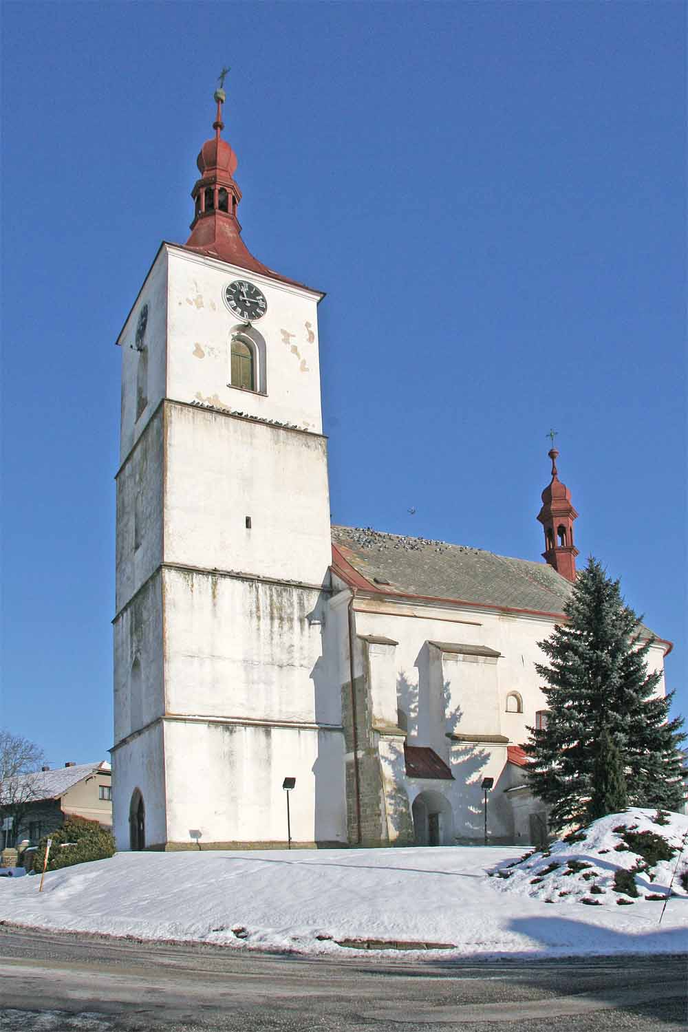 Kostel Sv. Prokopa ve Starém Bydžově